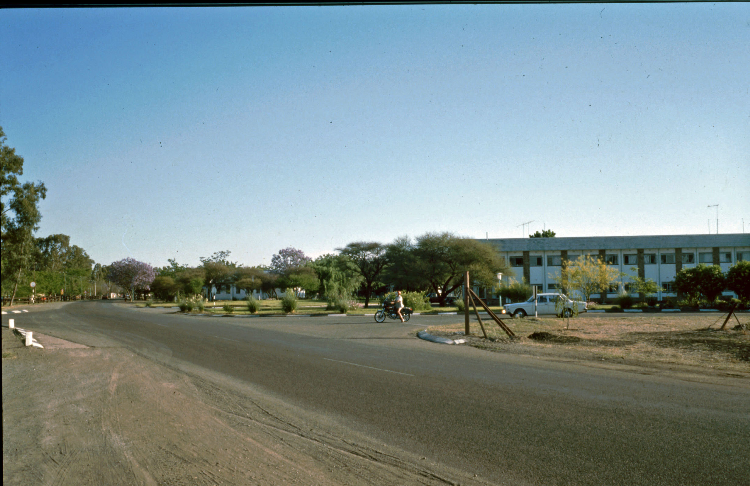 Swartklip